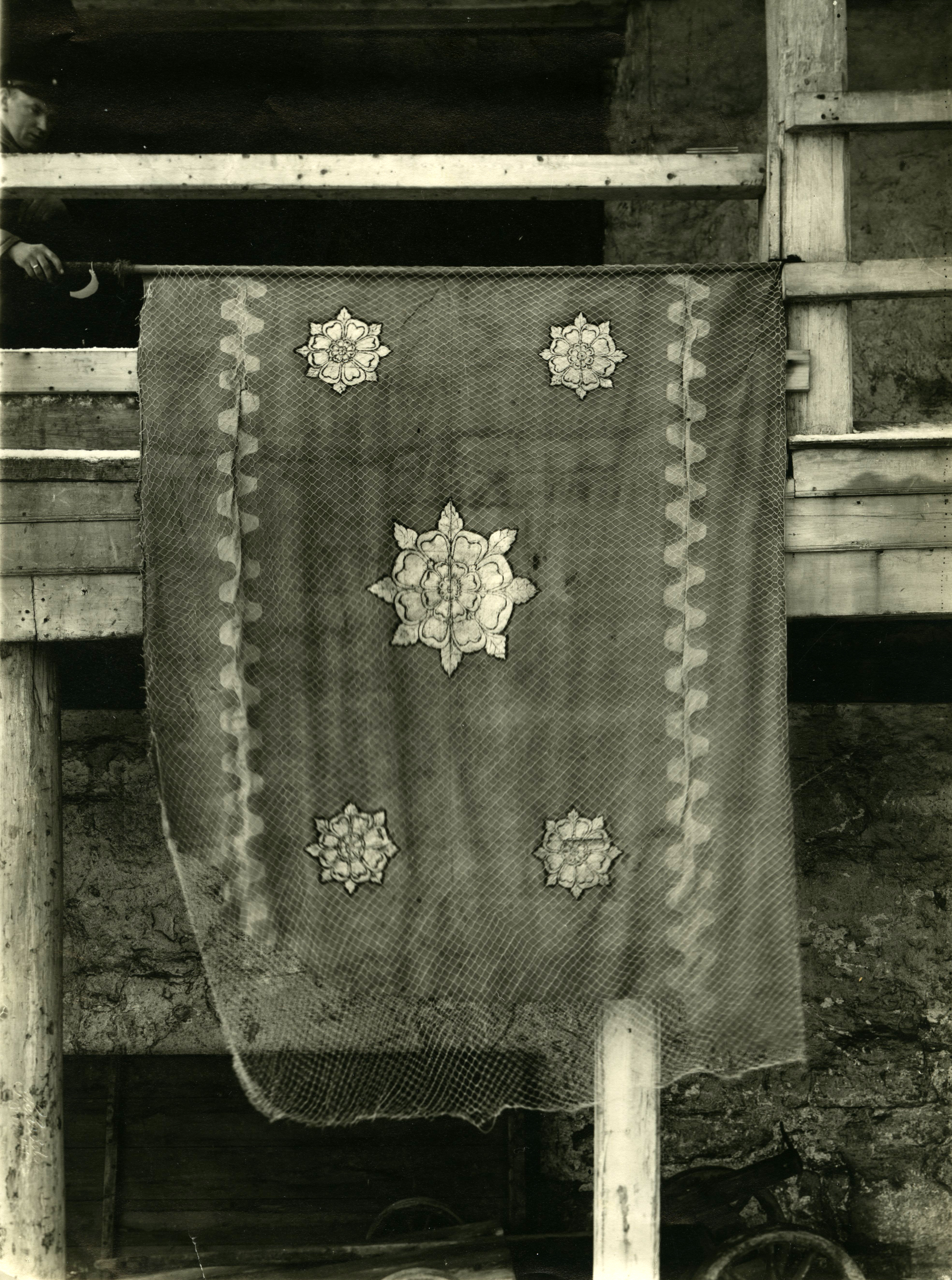 Format: Fotopositiv Dato / Date: Antagelig 1897 Fotograf / Photographer: Antagelig Erik Olsen (1835 - 1920) Sted / Place: Trondheim (Antagelig fra den historiske utstilling i Trondhjem 1897) Wikipedia: Borgervæpning Eier / Owner Institution: Trondheim byarkiv, The Municipal Archives of Trondheim Arkivreferanse / Archive reference: Tor.H41.B41.F3082 Merknad: Fra utstillingen i anledning Trondhjems 900-årsjubileum i 1897. Utstillingstekst i Trondhjems 900 Aars Jubilæum: Katalog for Den Historiske Udstilling i Trondhjem 1897: 522. Schøller, Cecilie Christine, f. Frølich, f. 16/3 1700 p. Teige ved Tønsberg, d. i Kbhavn 19/4 1786; g. 1/12